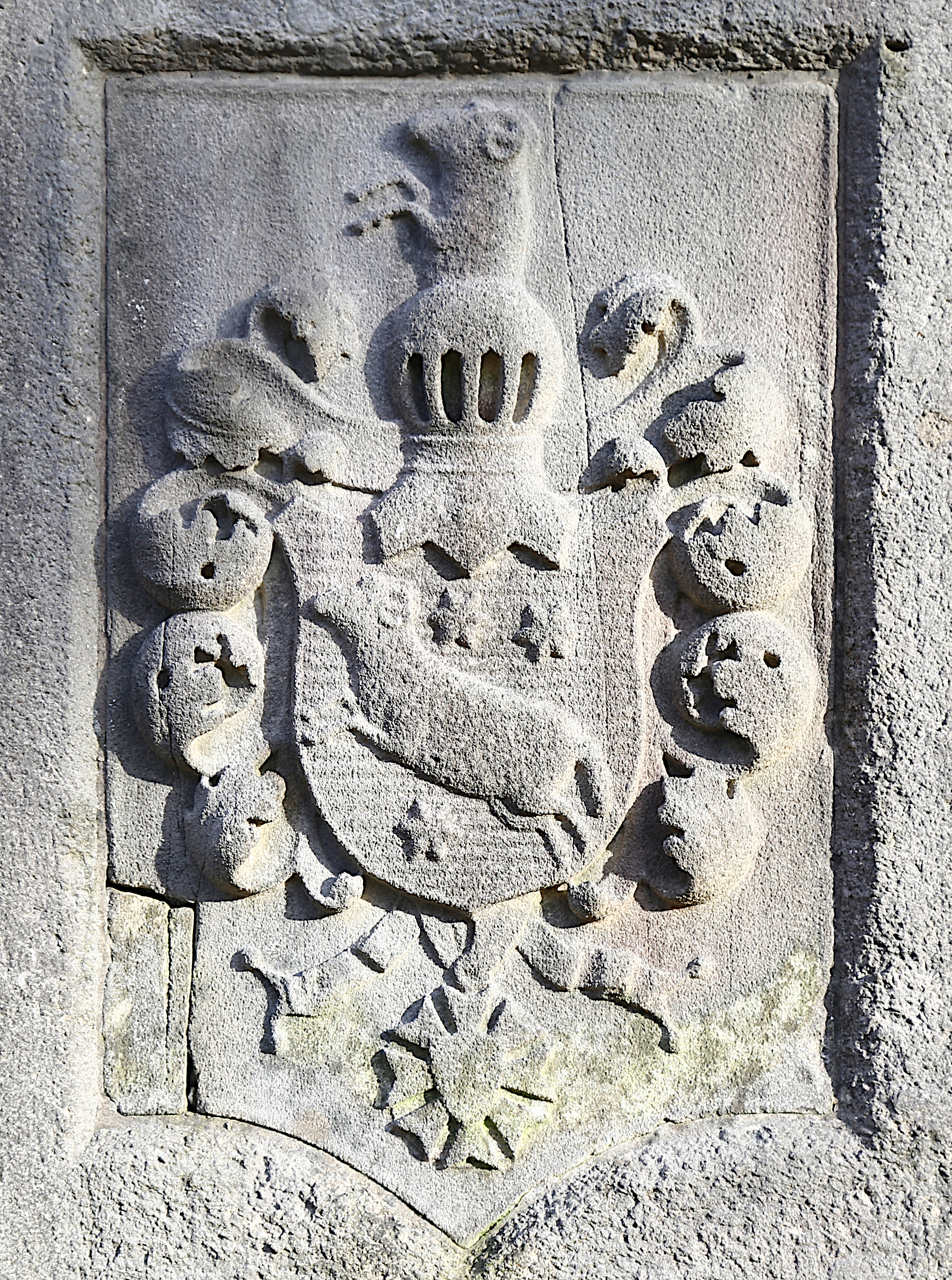 Wappen der Familie von Widder auf dem Grabstein von Gabriel Bernhard von Widder, auf dem Münchner Alten Südfriedhof